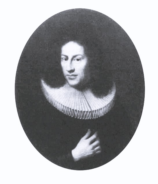 Jacob von Melle (* 17. Juni 1659 in Lübeck; † 13. Juni 1743 ebenda), deutscher lutherischer Theologe; Epithaph-Portrait in der Lübecker Marienkirche